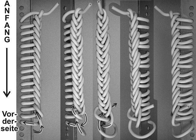 Schema der Halsschnur von Bunsoh, einem Kleidungsbestandteil der Moorleiche von Bunsoh, die 1890 im Schalkholzer Moor, bei Albersdorf im Kreis Dithmarschen gefunden wurde. Angefertigt von Heinke Arnold.